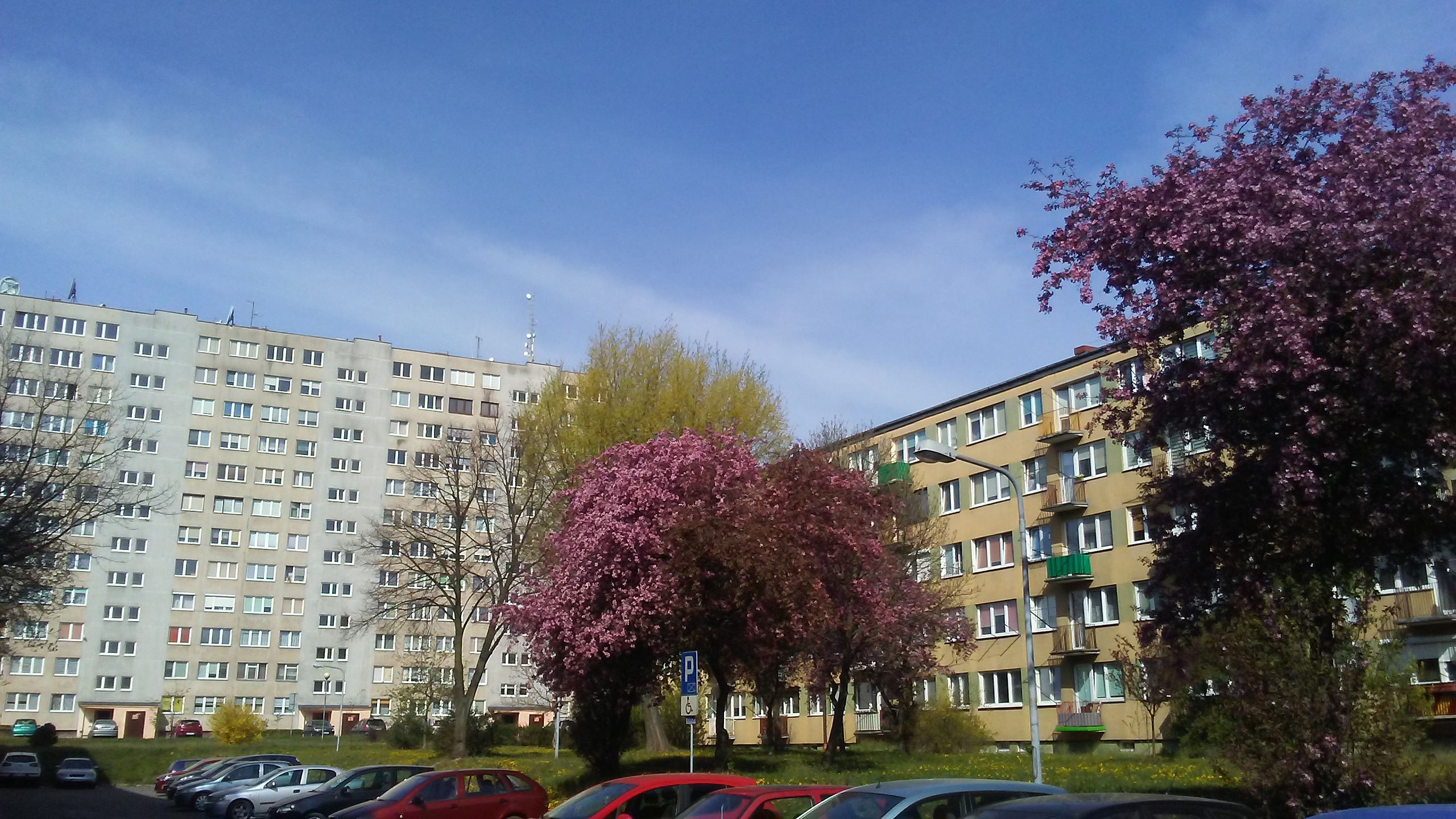 Podwórko przy ulicy Wróblewskiego na największym osiedlu mieszkaniowym Tomaszowa Mazowieckiego – Niebrowie